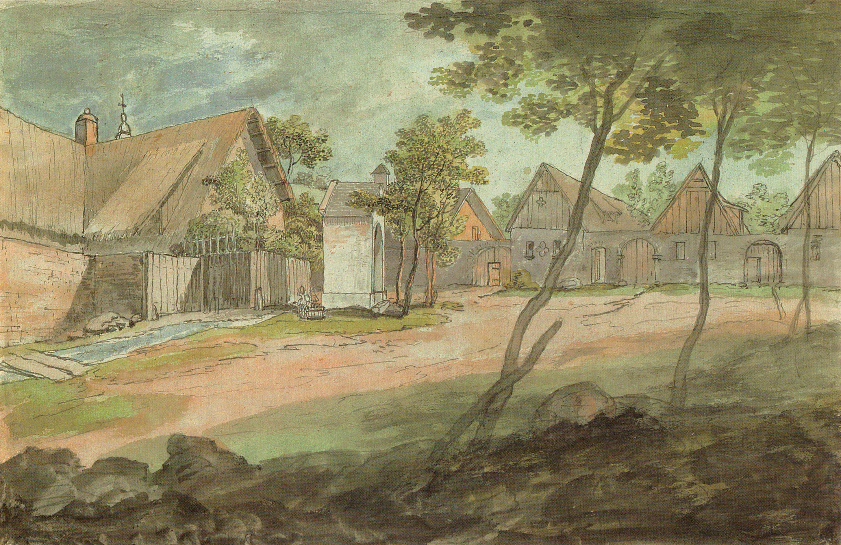 St. Georgen (Burgenland)